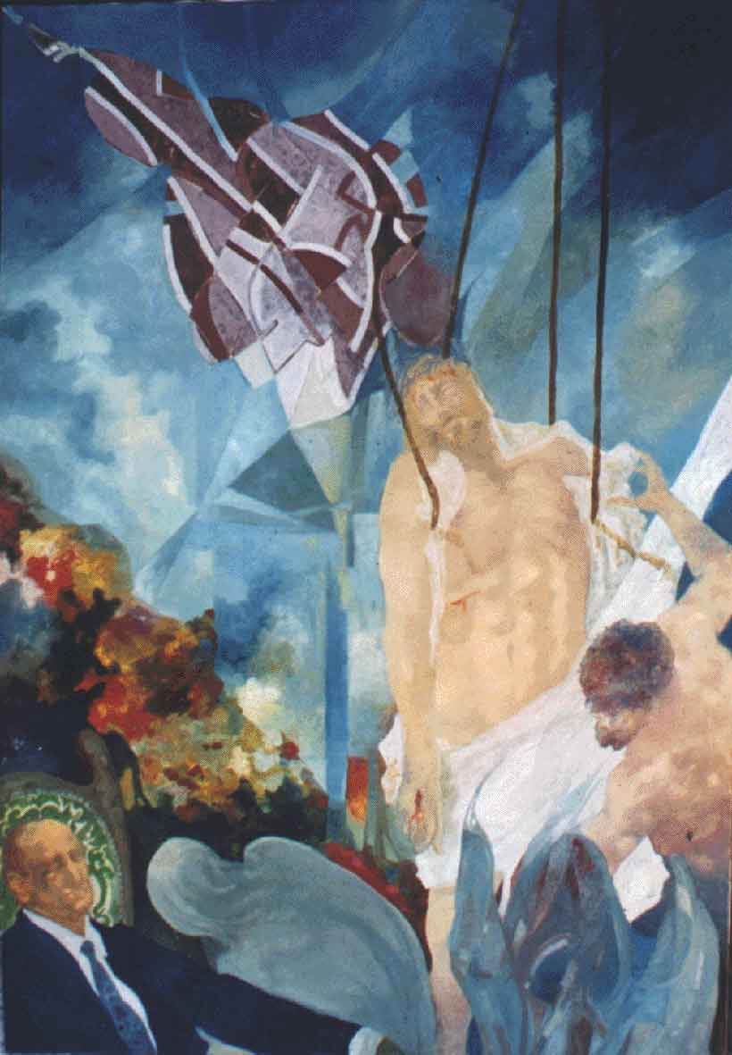 Olio su tela, 200x180 - Vangelo di GIOVANNI.